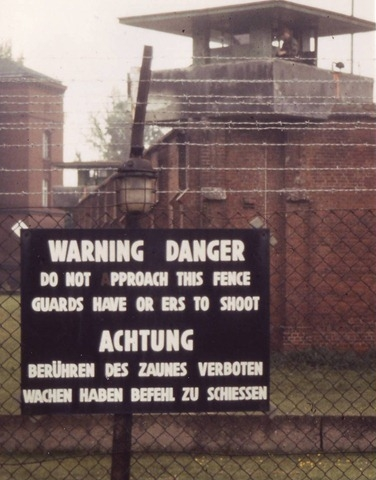 Kriegsverbrechergefängnis Spandau - Wachturm Wilhelmstraße